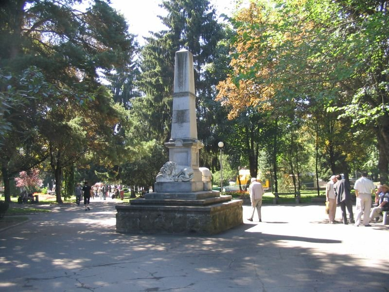 48-as emlékmű, Sepsiszentgyörgy, saját kép, 2004.